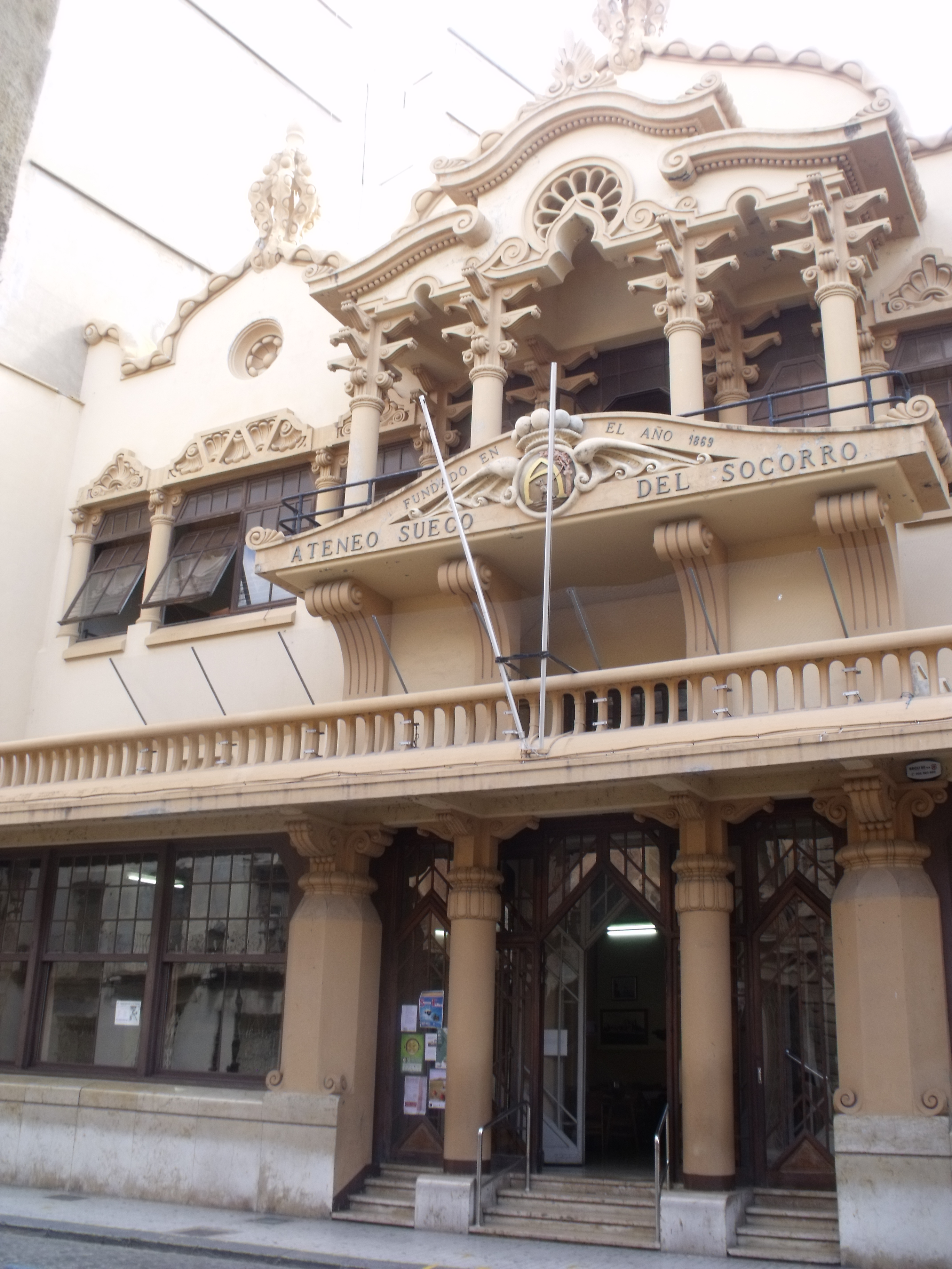 Fachada del ateneo